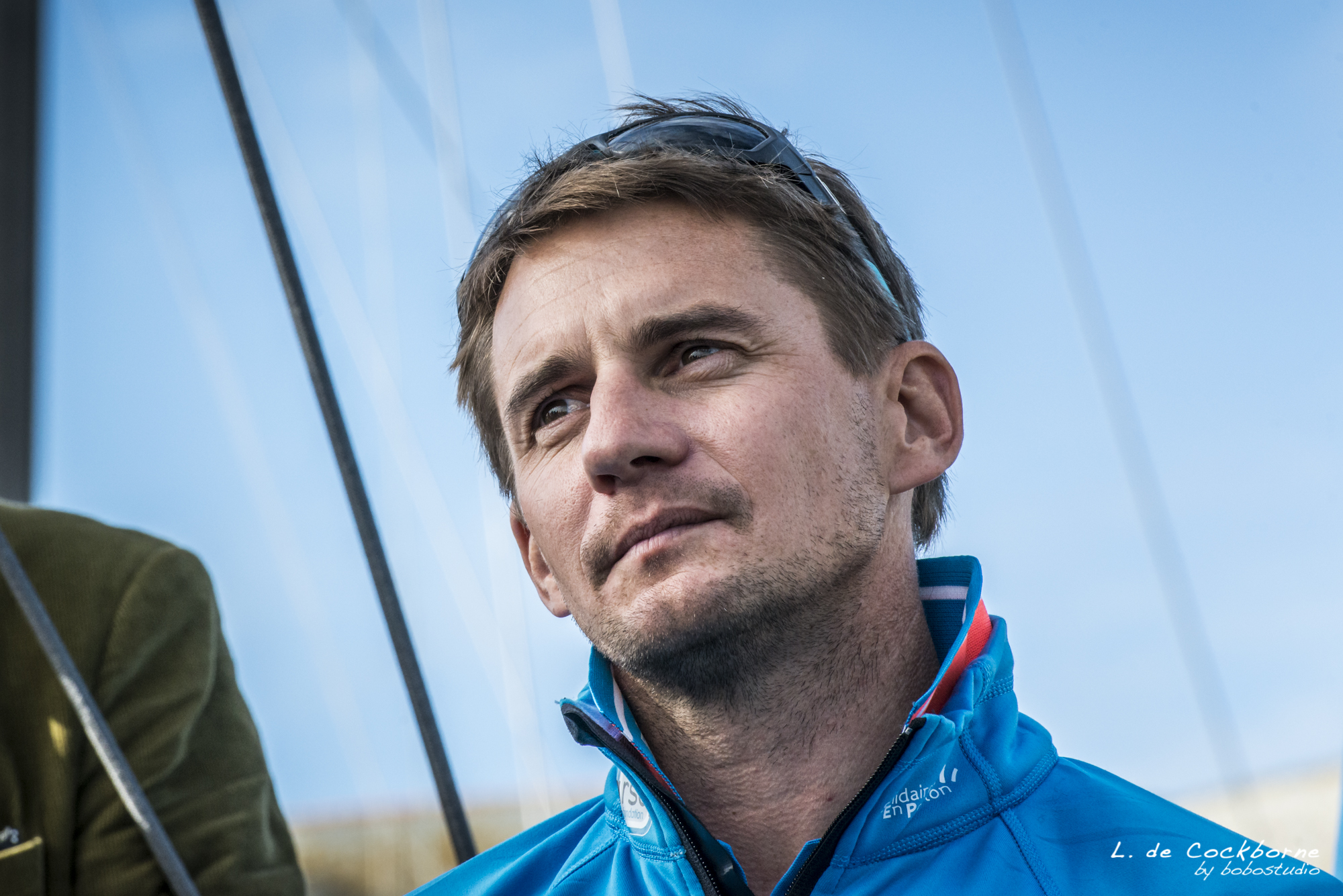 Thibaut VAUCHEL-CAMUS - Route du Rhum 2014